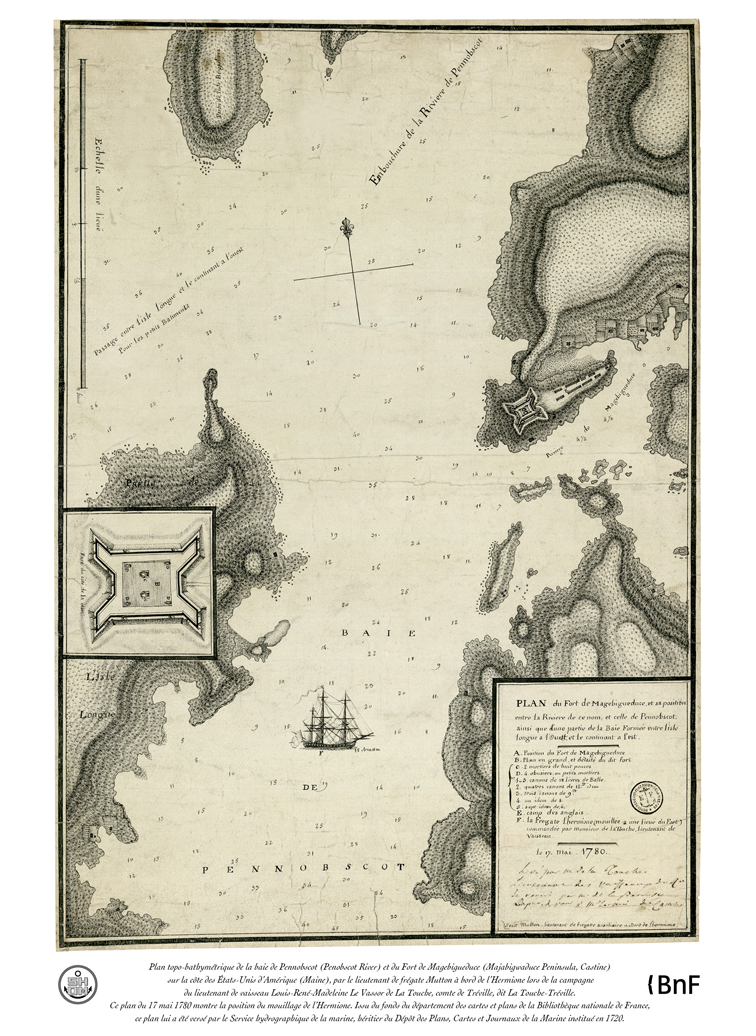 Plan topo-bathymétrique de la baie de Pennobscot (Penobscot River) et du Fort de Magebigueduce (Majabigwaduce Peninsula, Castine) sur la côte des États-Unis d'Amérique (Maine), par le lieutenant de frégate Mutton à bord de l'Hermione lors de la campagne du lieutenant de vaisseau Louis-René-Madeleine Le Vassor de La Touche, comte de Tréville, dit La Touche-Tréville. Ce plan du 17 mai 1780 montre la position du mouillage de l'Hermione. Issu du fonds du département des cartes et plan de la Bibliothèque nationale de France, ce plan lui a été versé par le Service hydrographique de la marine, héritier du Dépôt des Plans, Cartes et Journaux de la Marine institué en 1720. Plan publié par le SHOM et l'Association Hermione-Lafayette lors de l'escale de l'Hermione à Castine en juillet 2015.